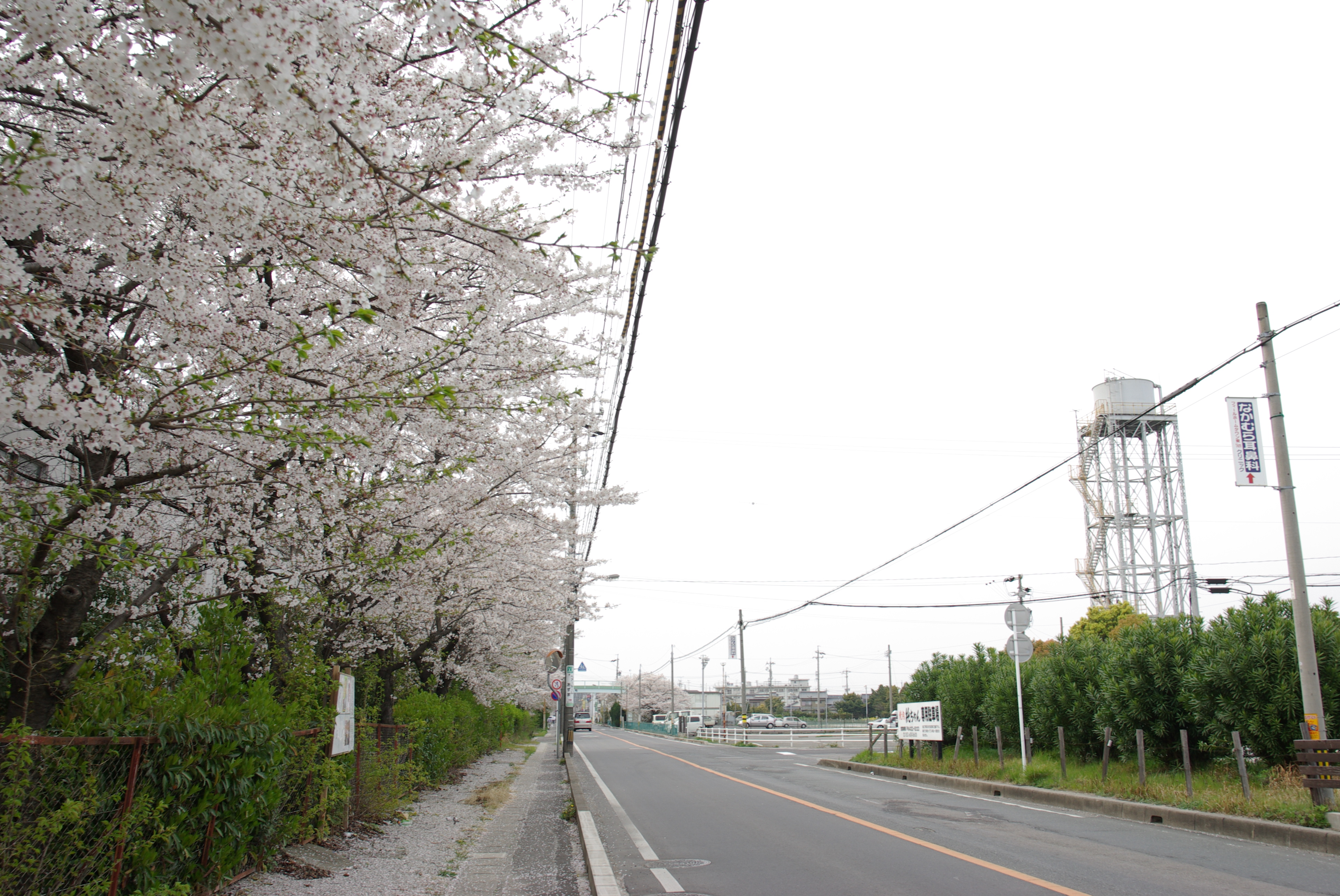 桜が咲く大府飛行場滑走路跡地。